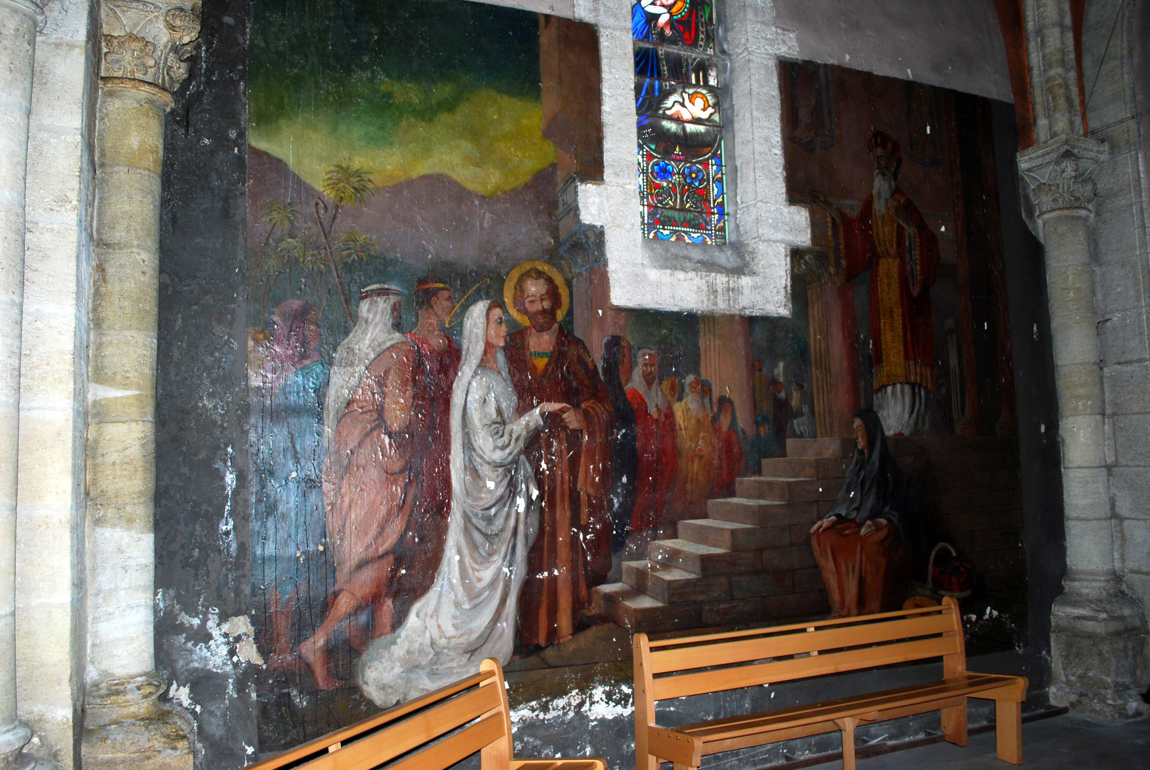 Capbreton église St Nicolas